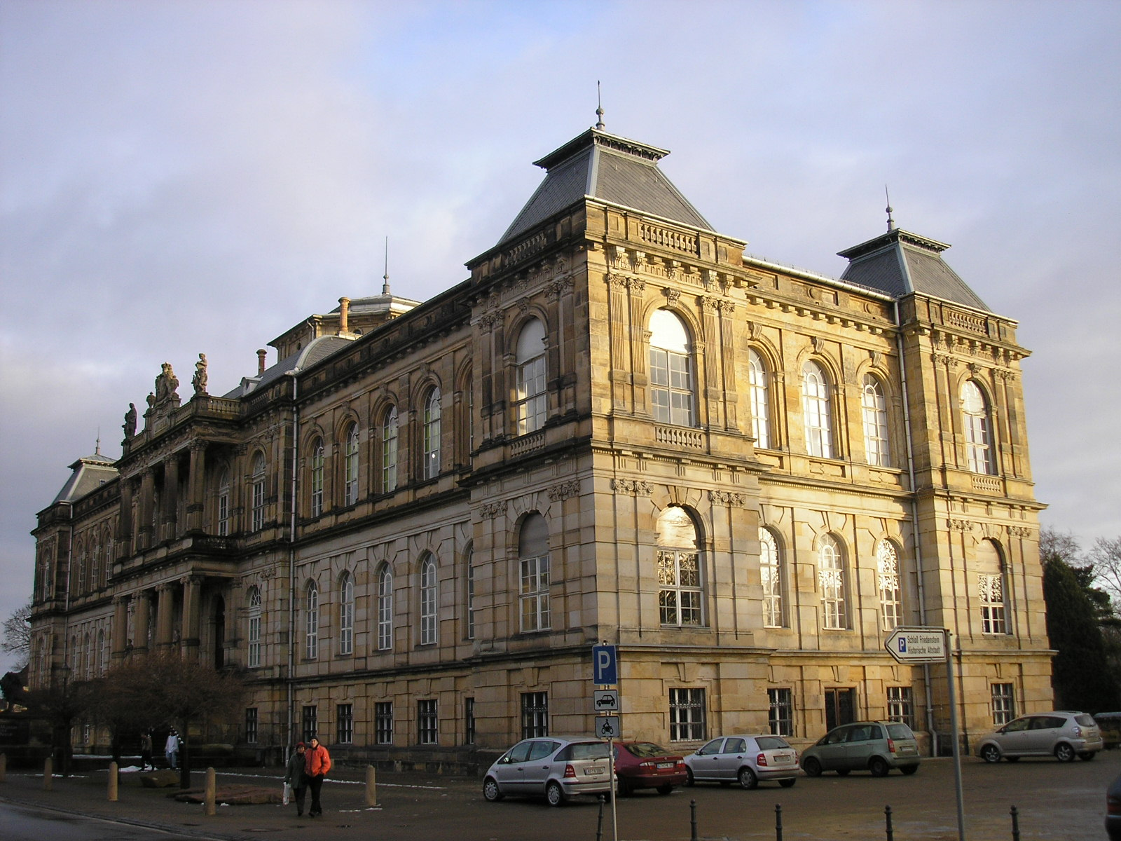 Das Museum der Natur in Gotha (Thüringen).